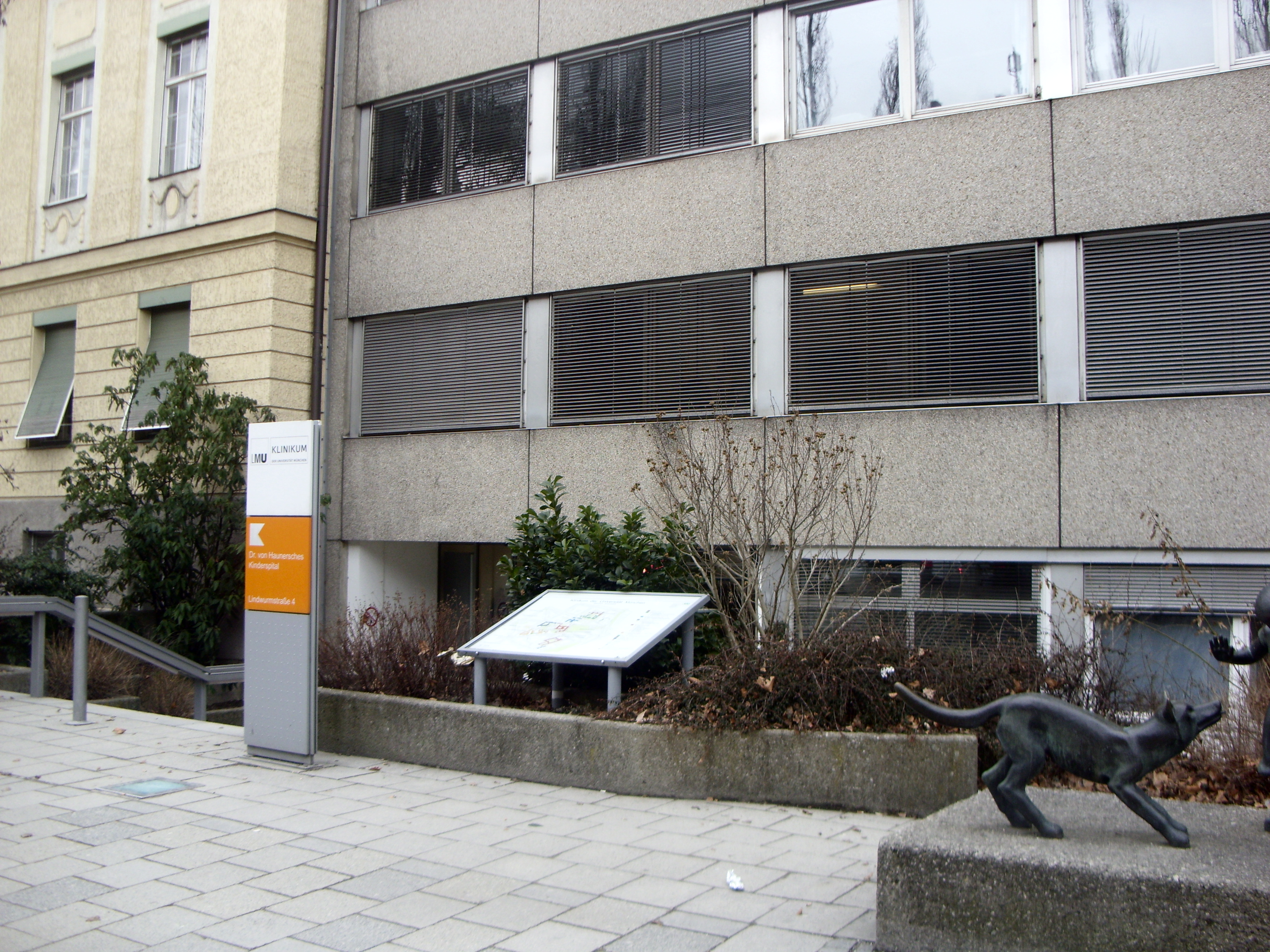 Haupteingang des Dr. von Haunerschen Kinderspitals in München